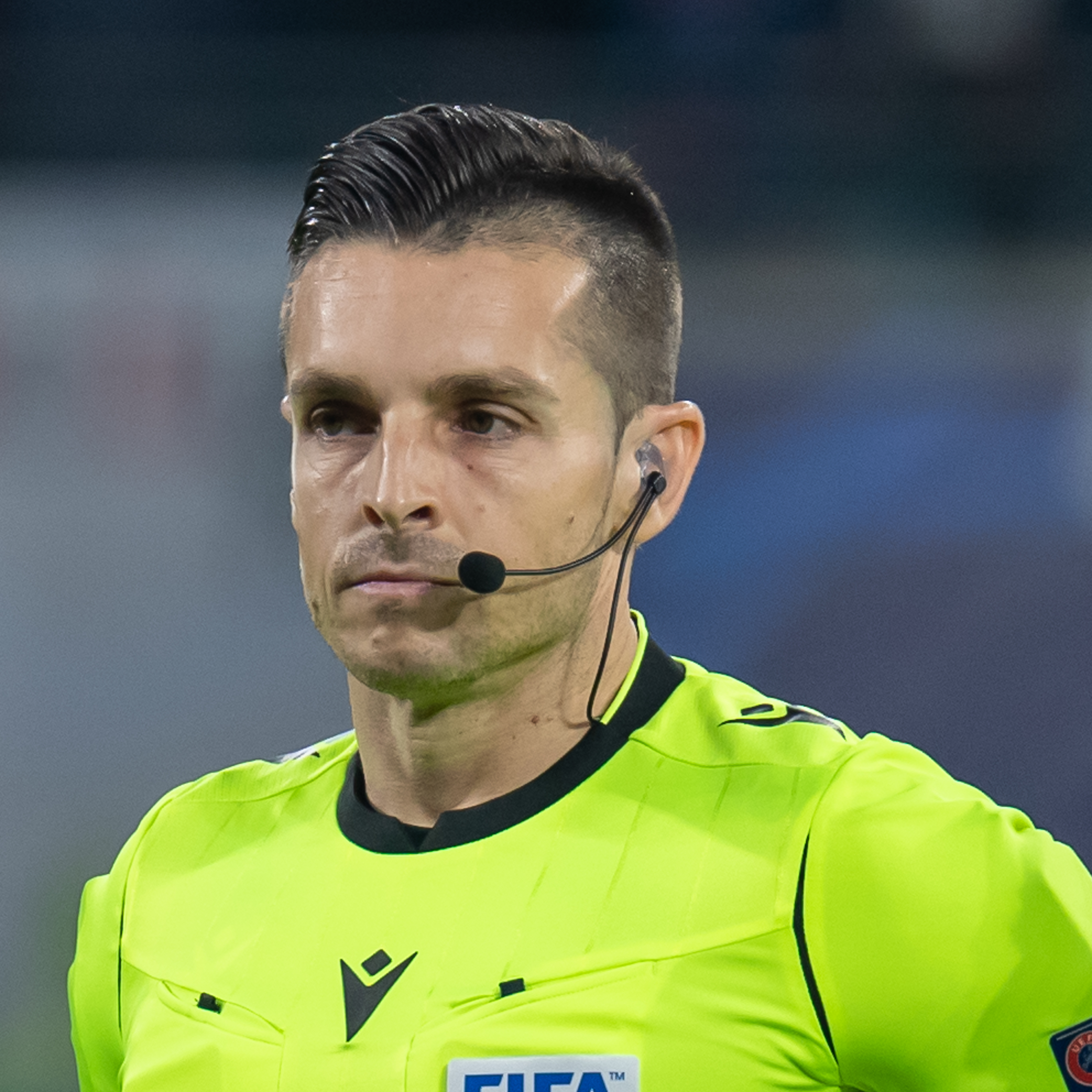 Fußball, Männer, UEFA Champions League Achtelfinale, RB Leipzig - Tottenham Hotspur; Schiedsrichter, referee Carlos Del Cerro Grande (ESP)